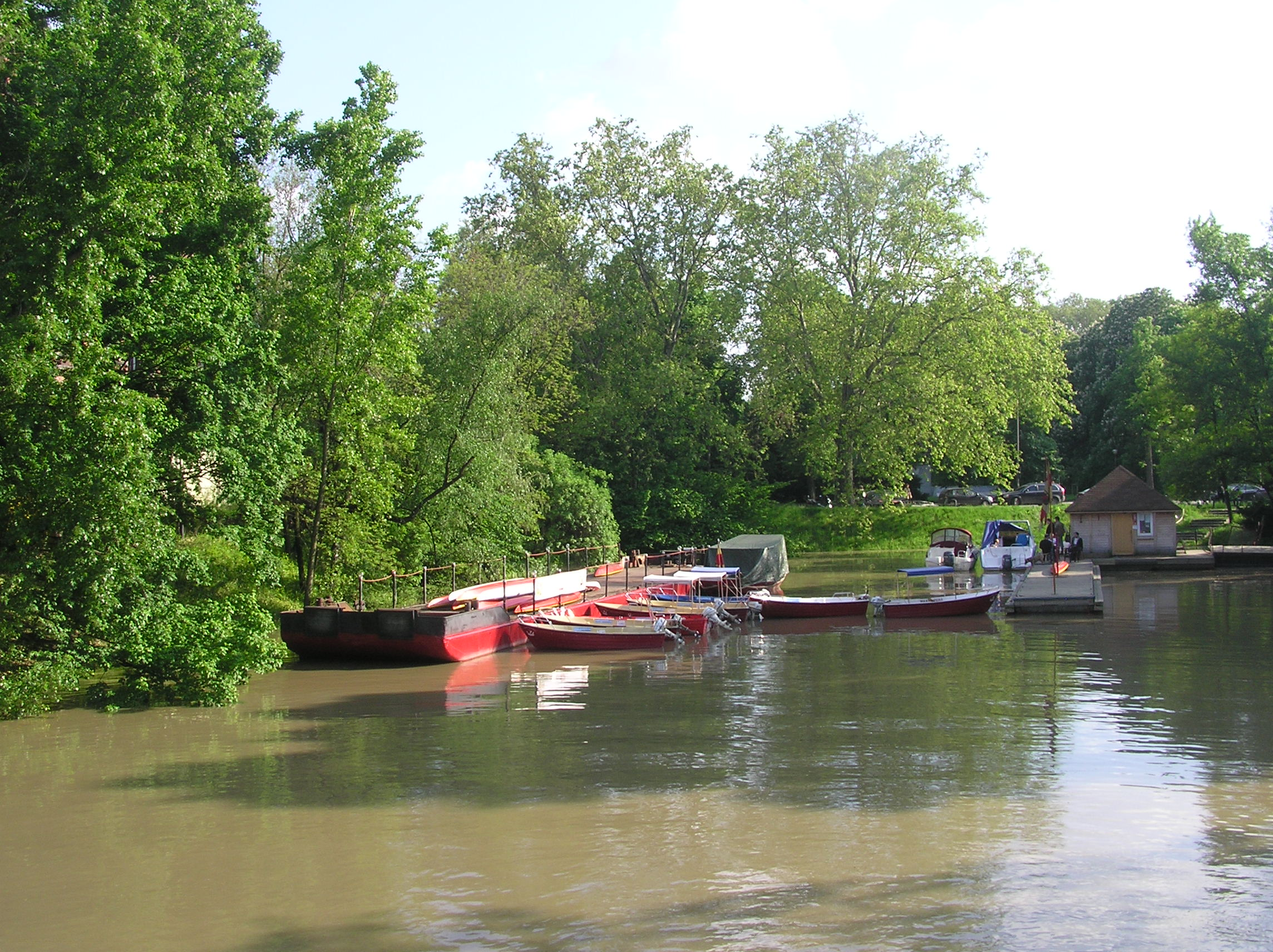 Zatoka Gondoli